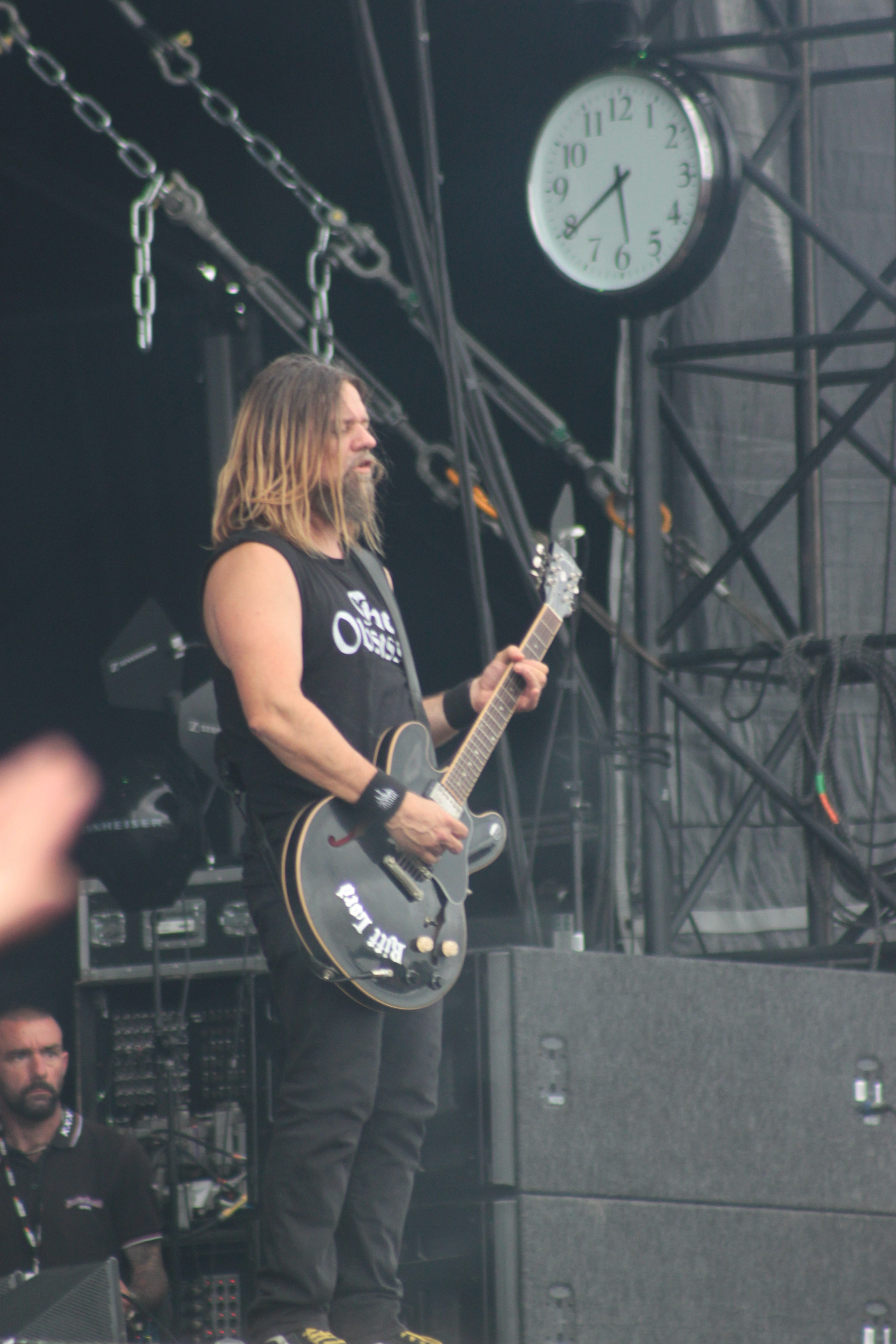 Pepper Keenan, Down, Hellfest 2013, Fr-44-Clisson.